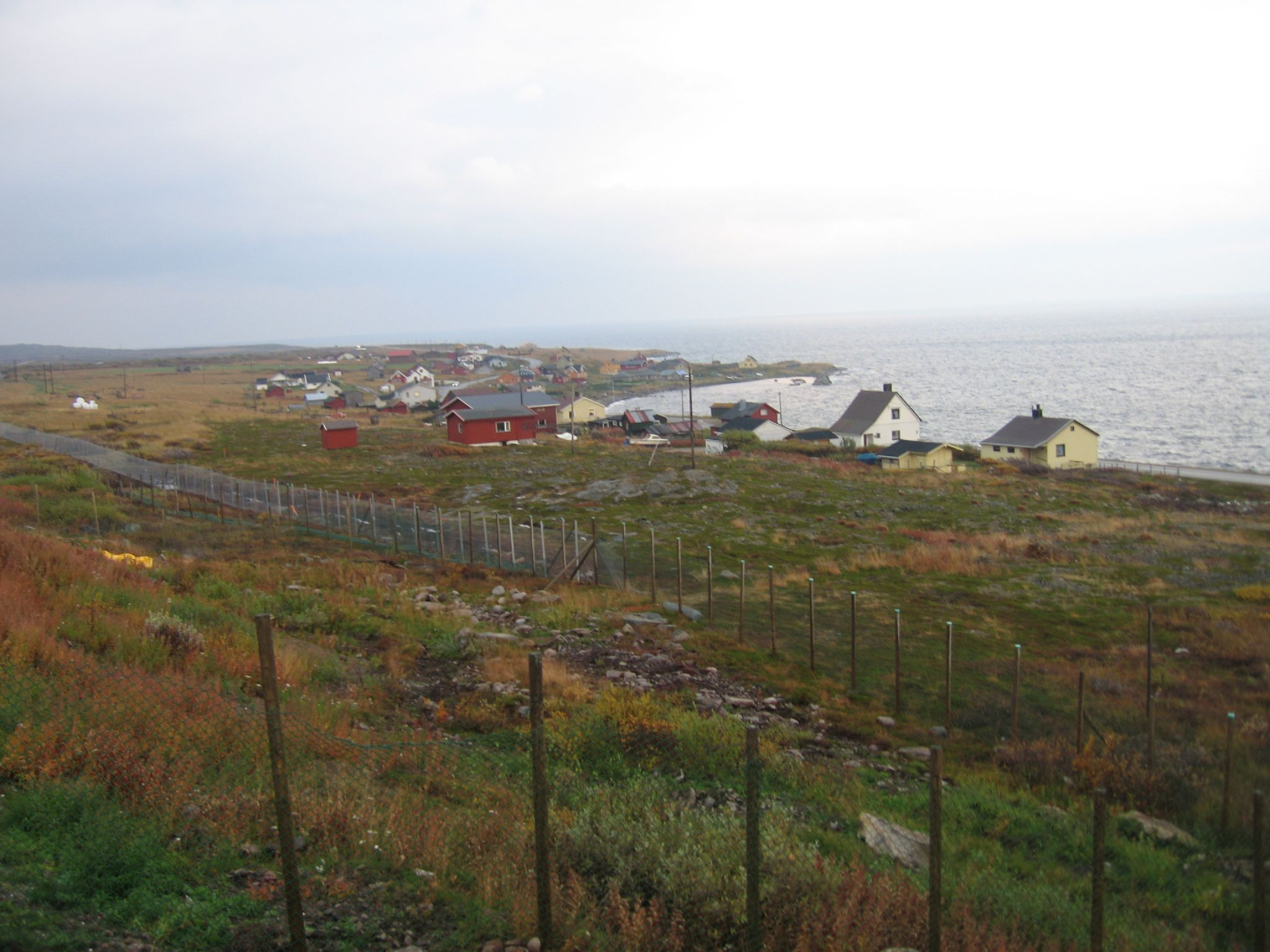 Kiby, Vadsø